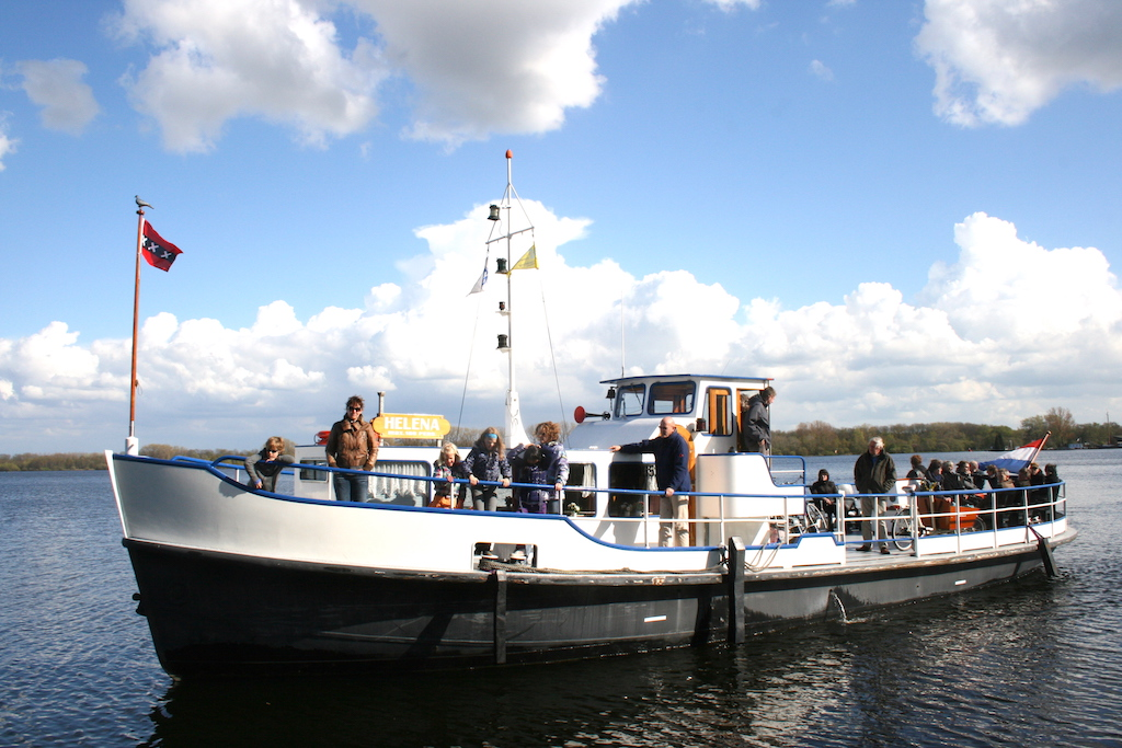 Motorschip 'Helena' op de Nieuwe Meer te Amsterdam. Foto: Erik Swierstra.